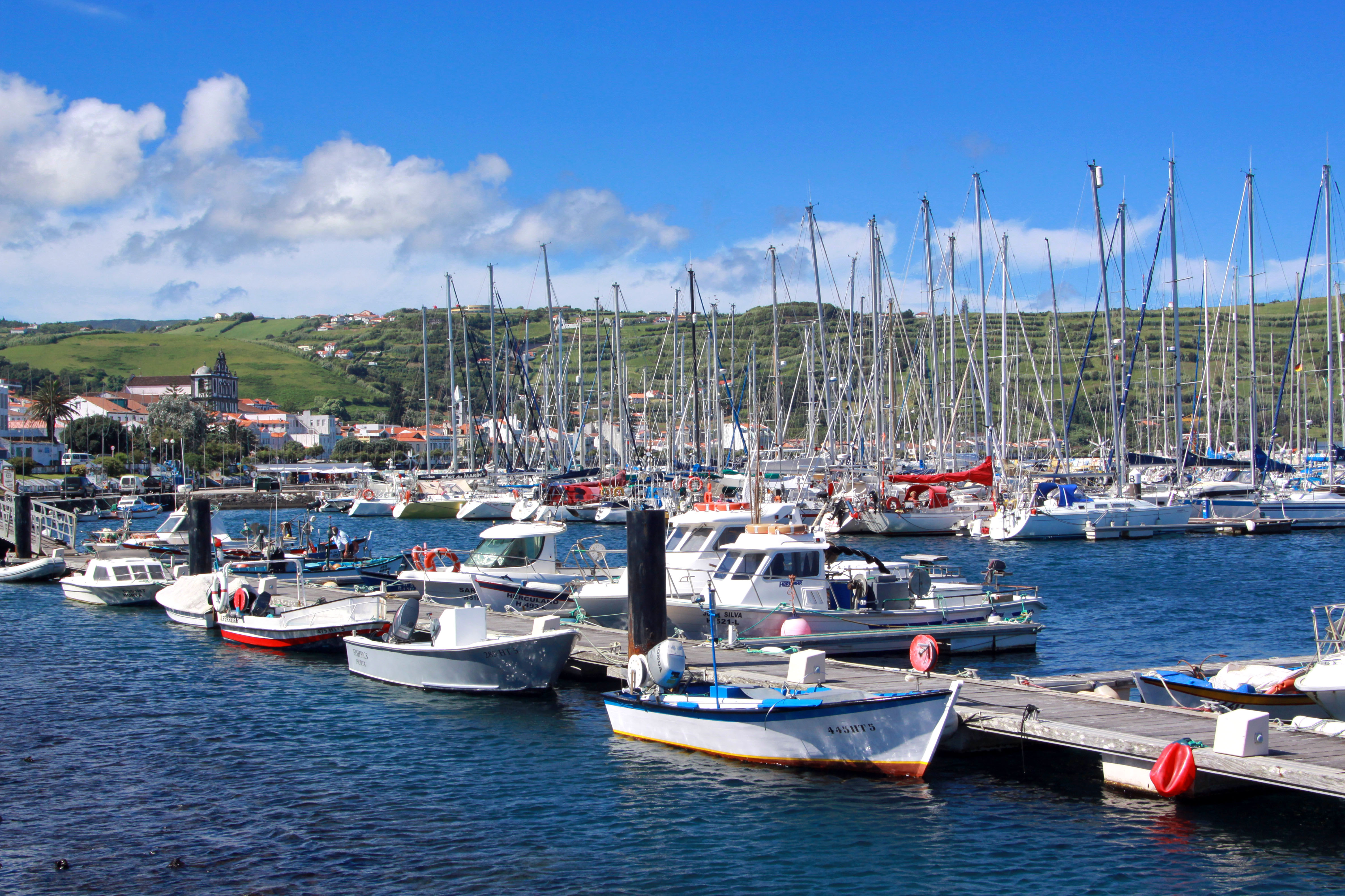 Ilha do Faial, Açores. Sur le port d'Horta.